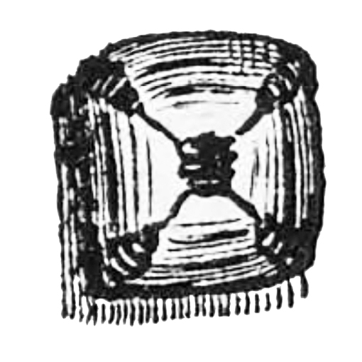 Representación de un “lapis crucífero” en el libro de Laet (1648) De Gemmis et Lapidibus.